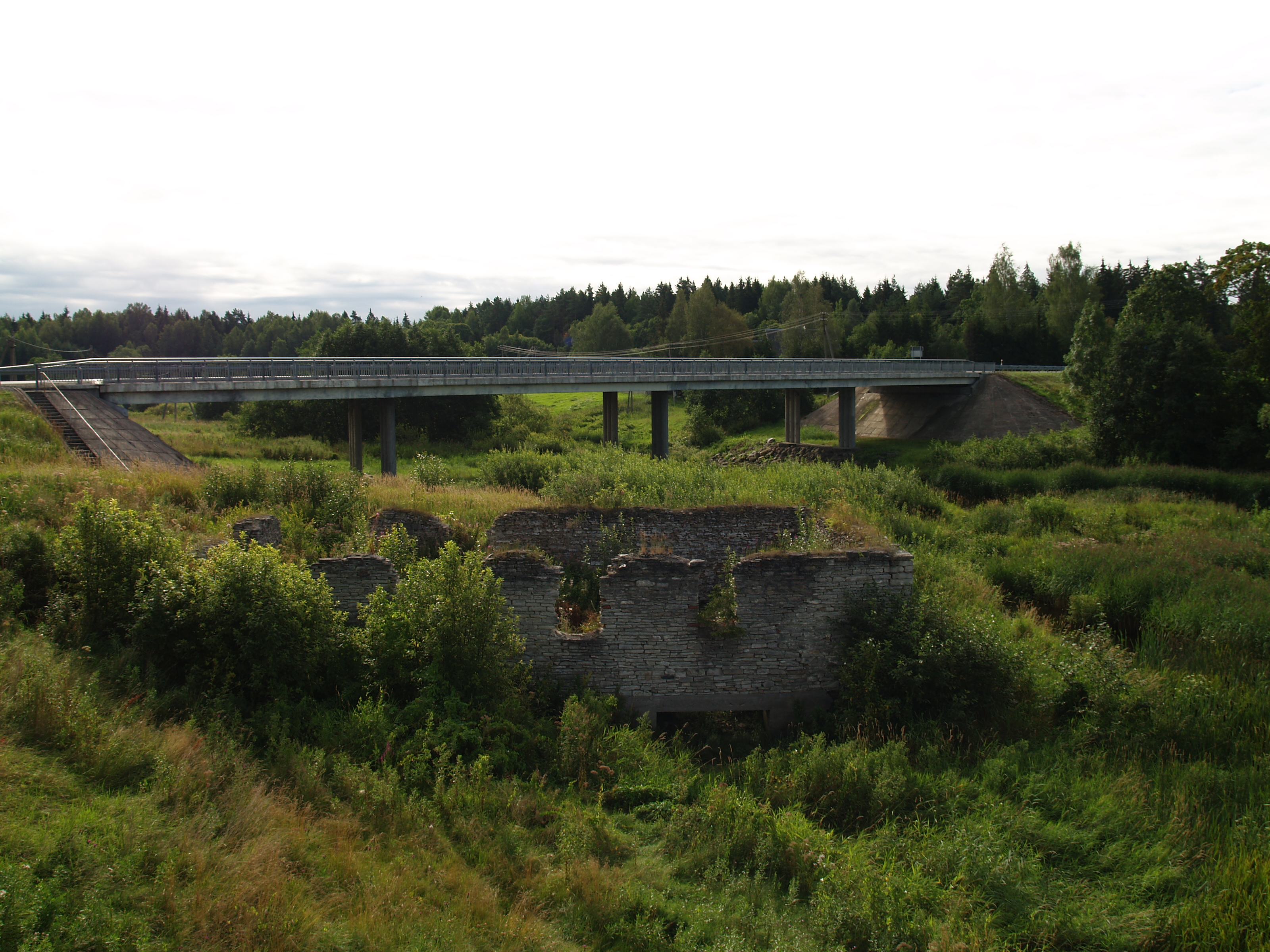 Konuvere maanteesild